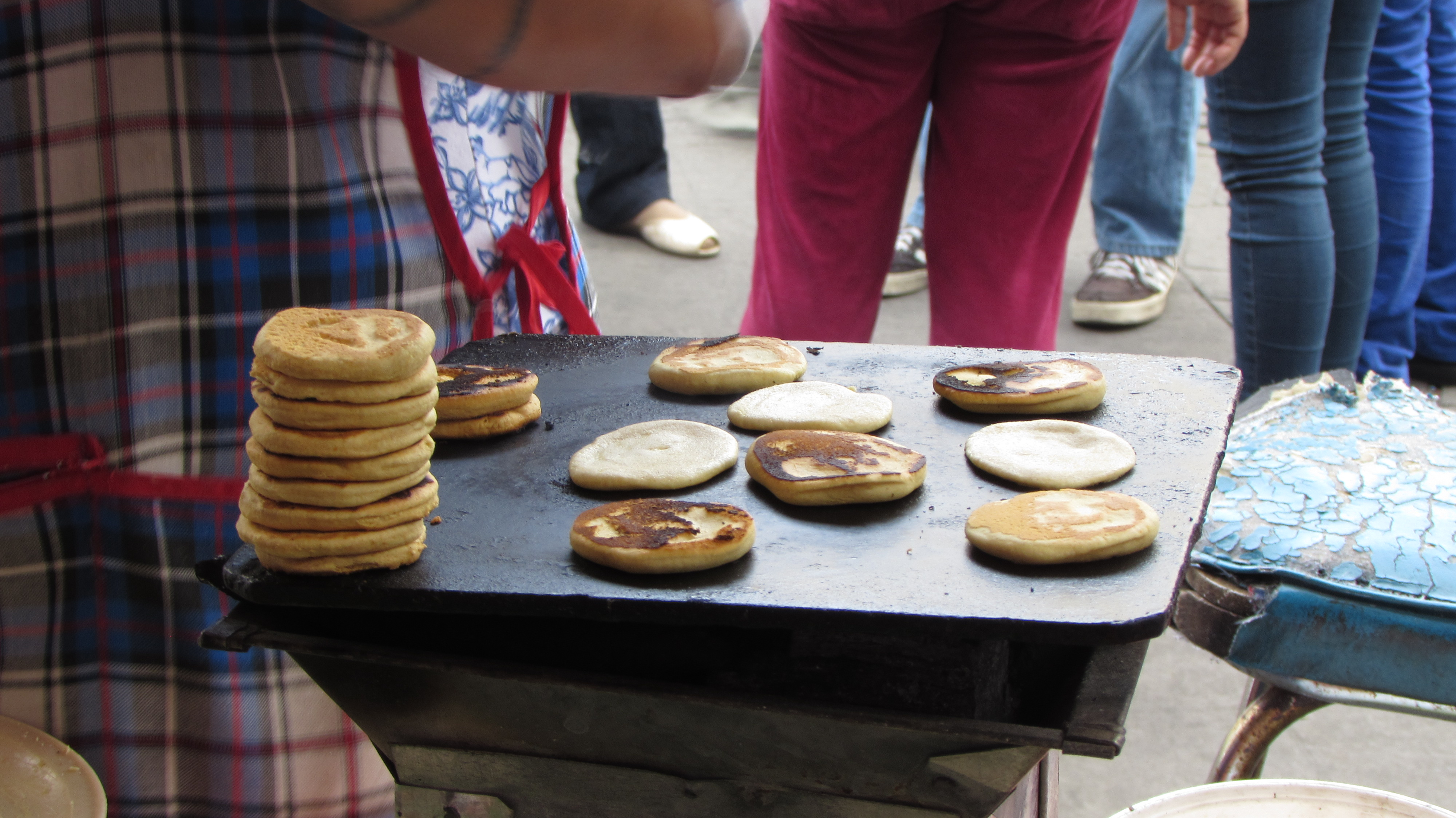 Gorditas de nata